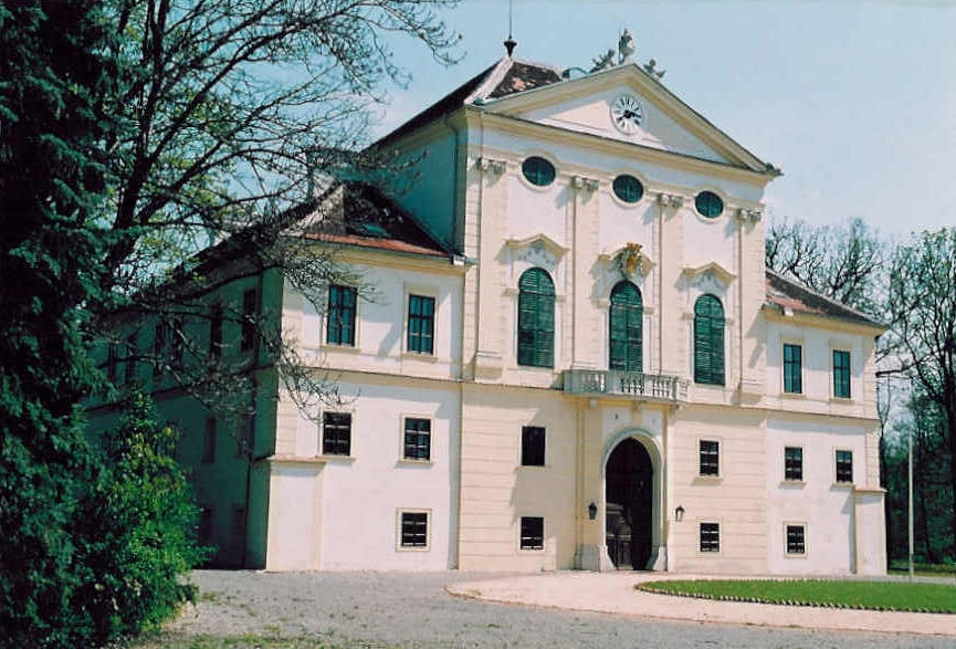 Schloss Kirchstetten im Weinviertel